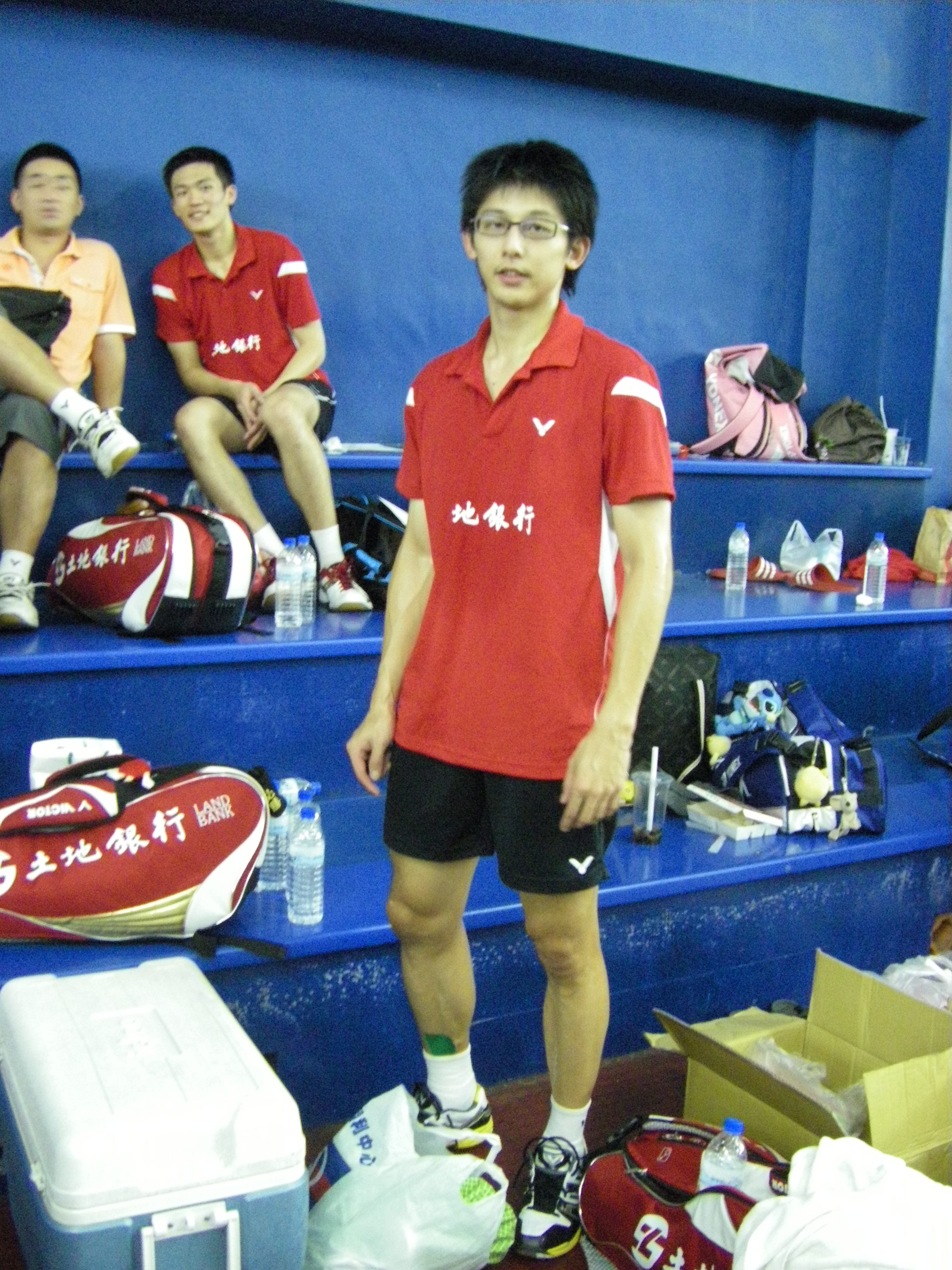 陳宏麟參加101年第2次全國羽球排名賽